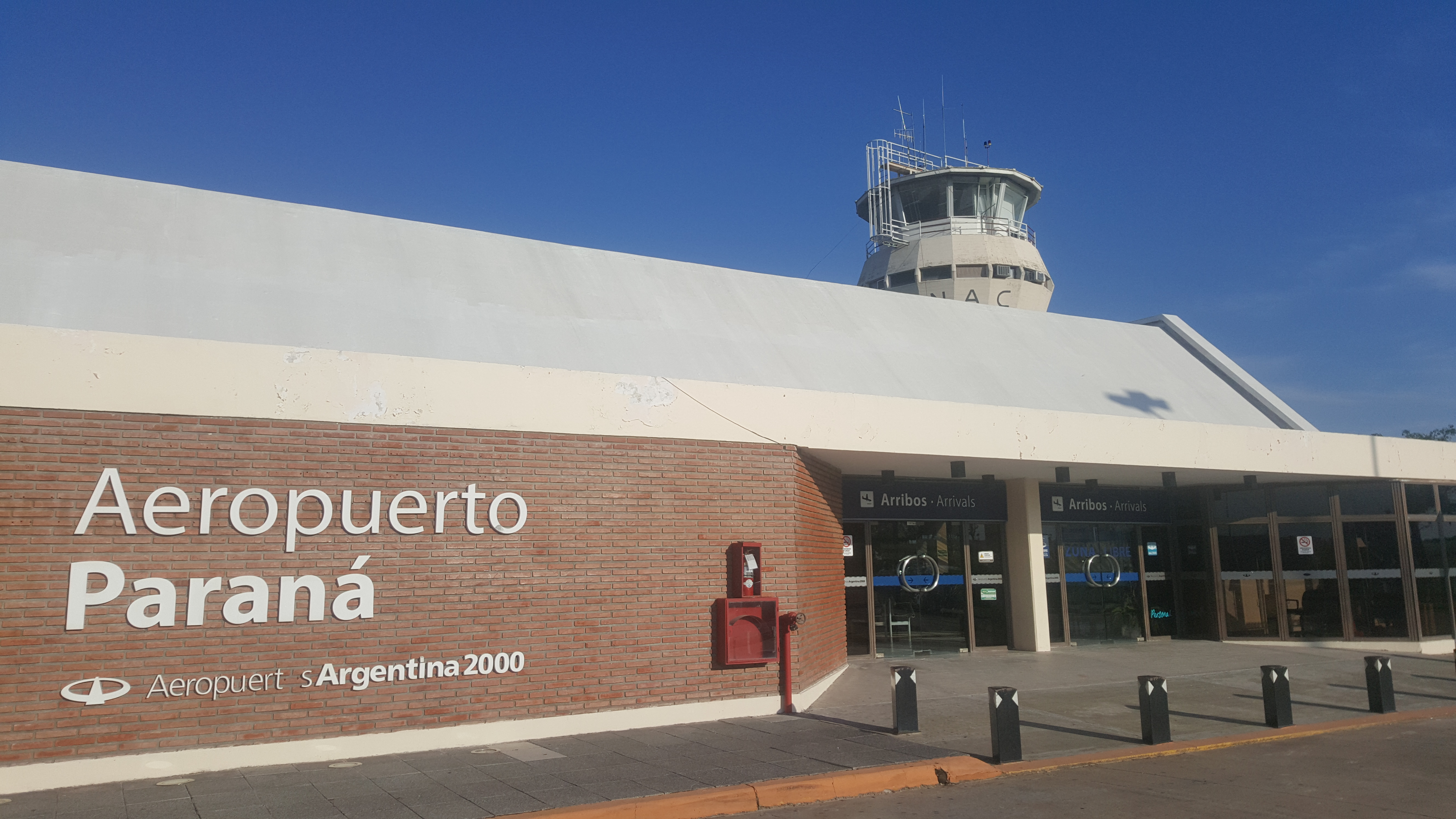 Vista general del edificio del aeropuerto "Justo José de Urquiza" de la ciudad de Paraná (OACI: SAAP)